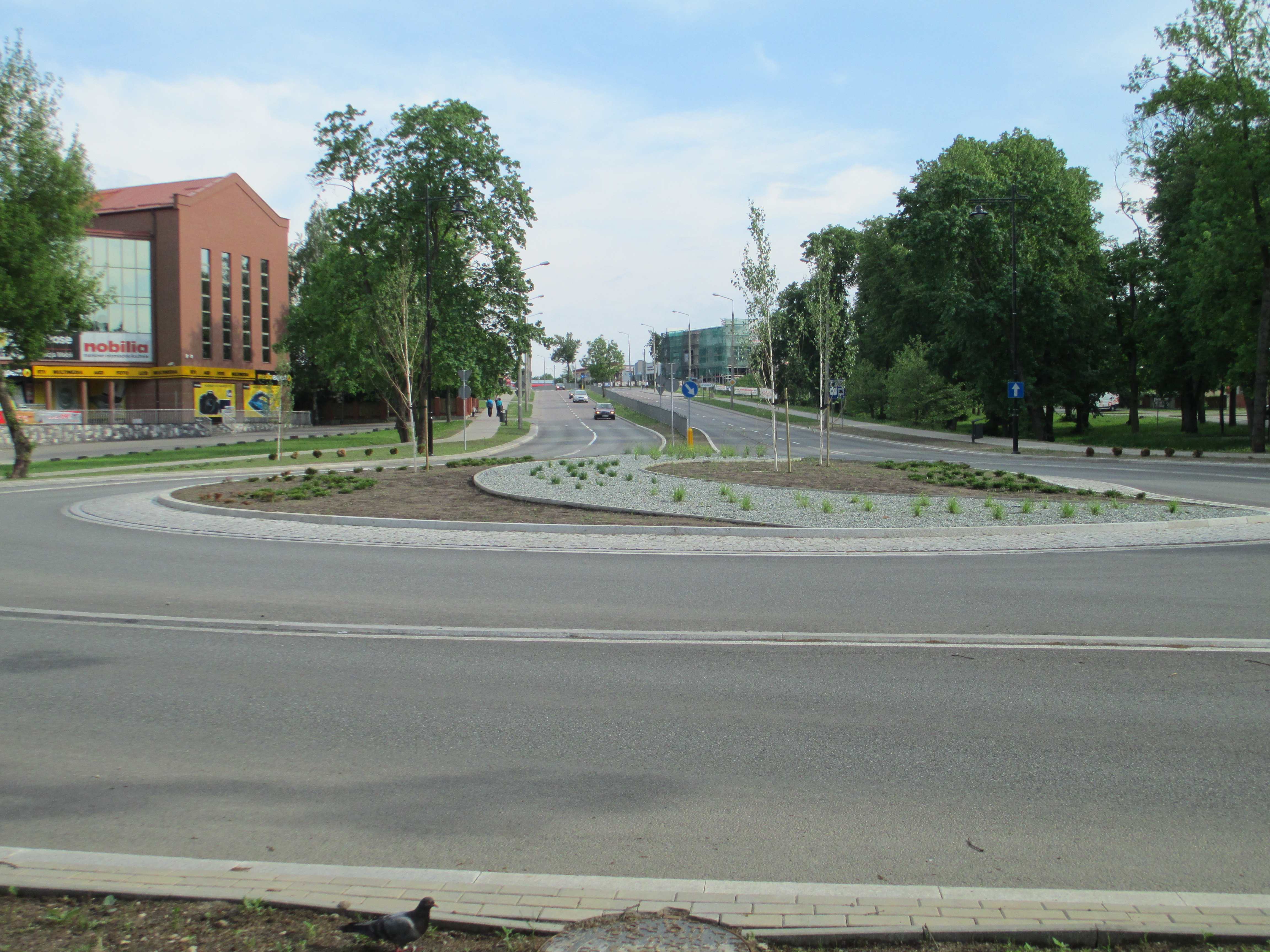 Ełk - Rondo Sapera